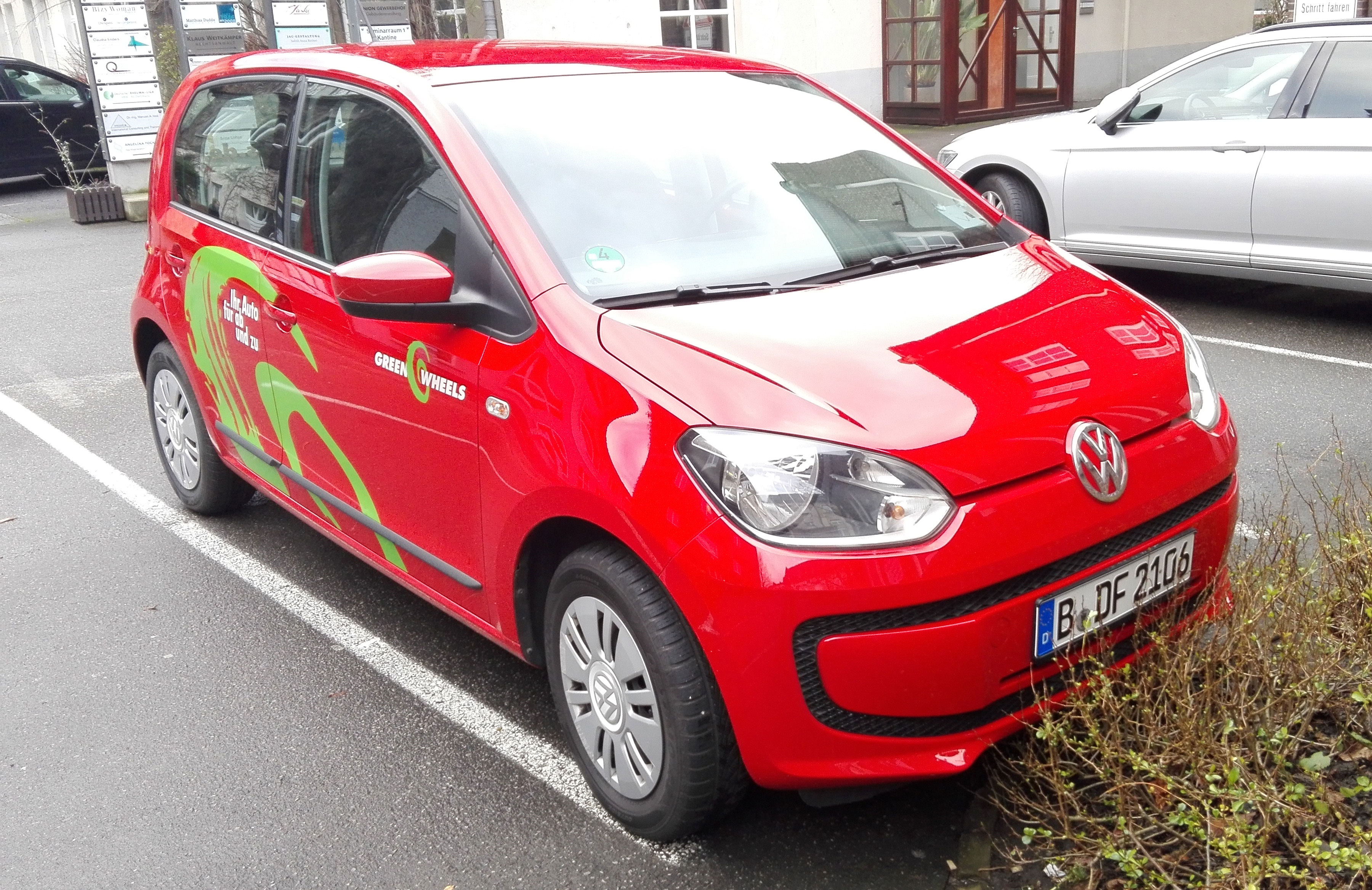 Greenwheels DE VW up!